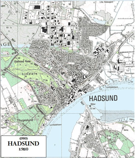 Kort over Hadsund i det tidligere Aalborg Amt omkring 1980.